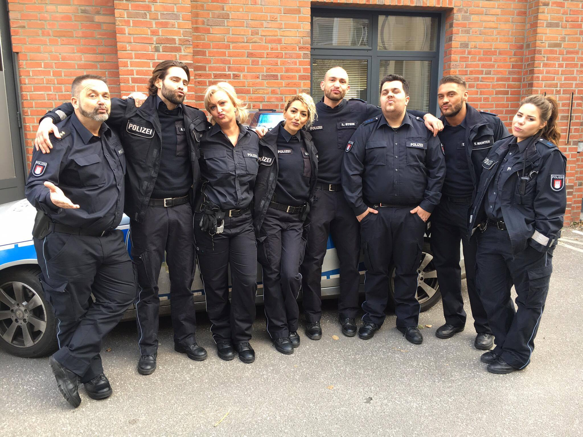 Das Bild zeigt einen Teil der Besetzung der Fernsehserie Die Wache Hamburg